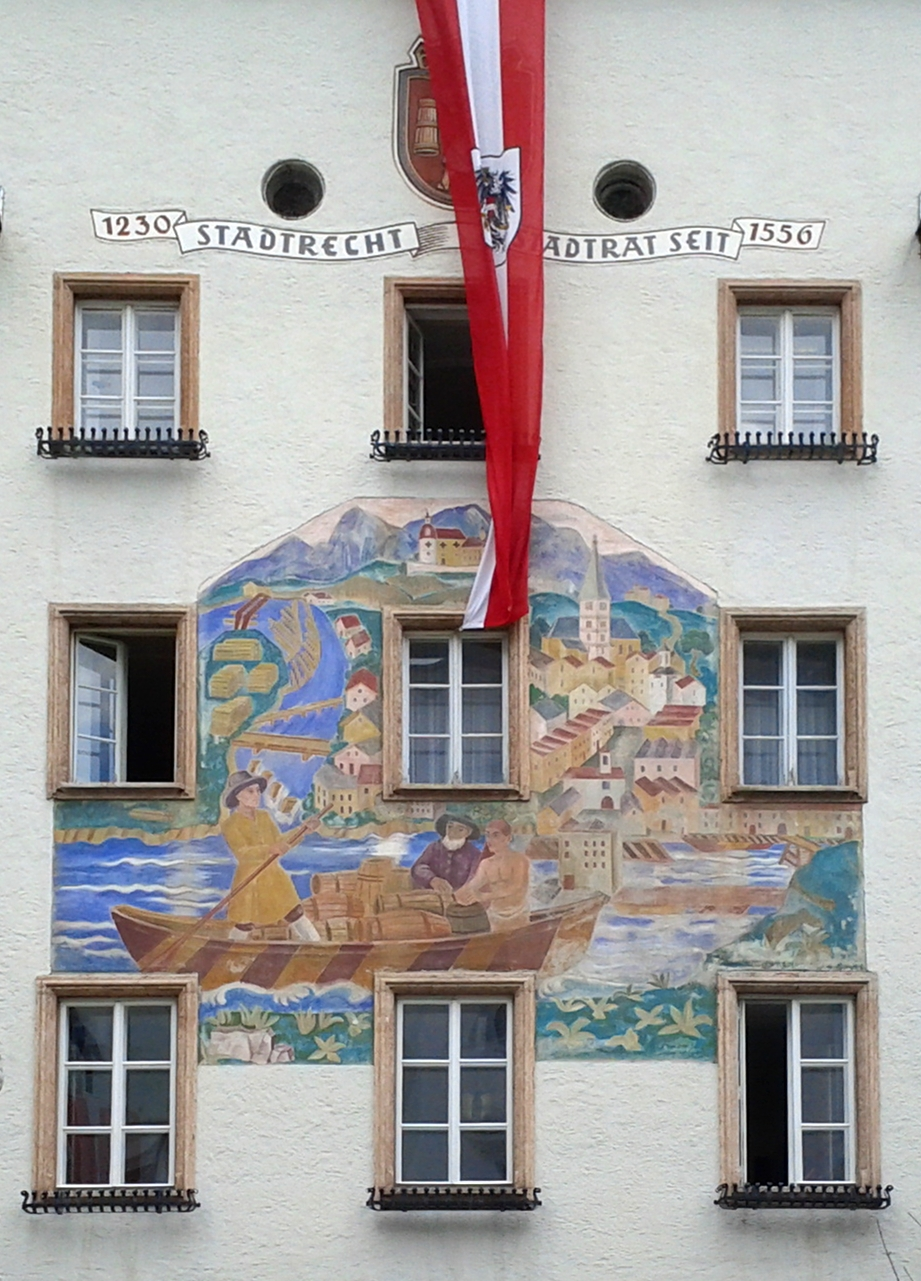 Rathaus Hallein - Schöndorfer Platz 14, Hallein. Wandgemälde von Theodor Kern.